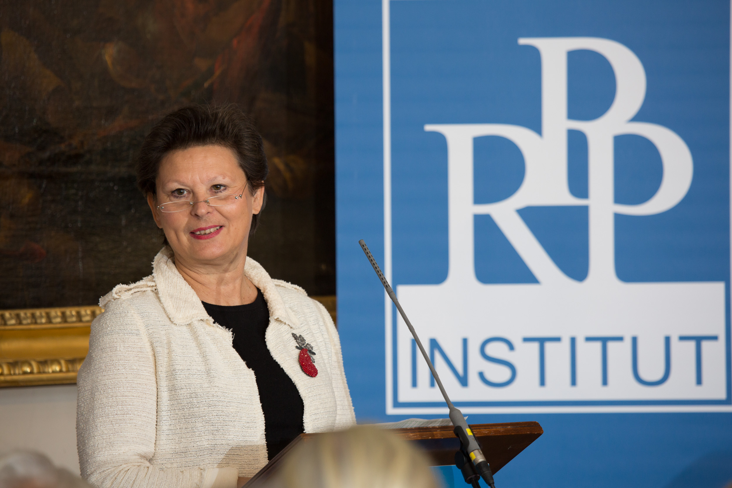 Jutta Fiegl auf der Fachtagung "Gottesfurcht & Heidenangst"